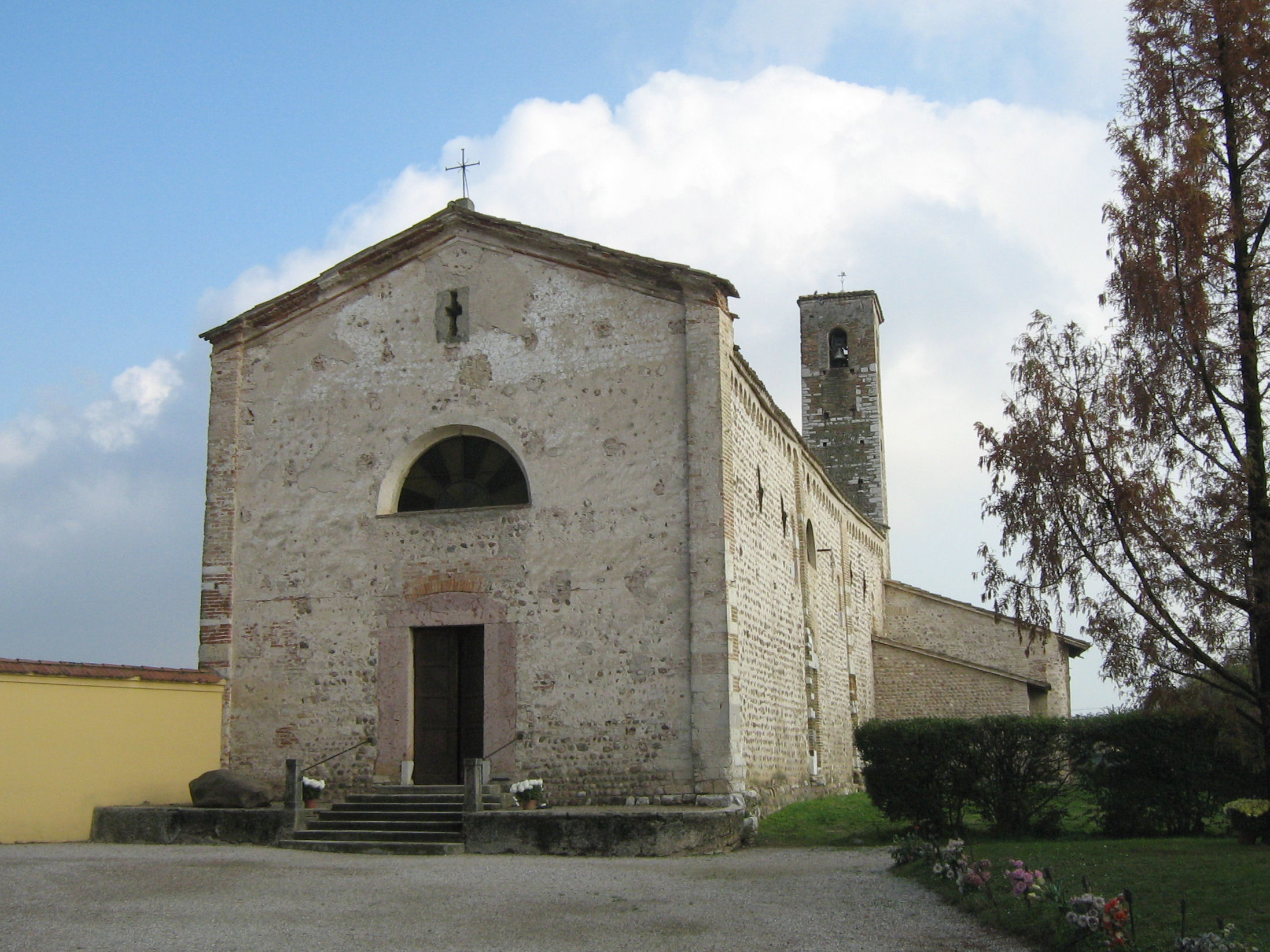 Medole, la Pieve. Coordinate geografiche: 45.326867,10.52256